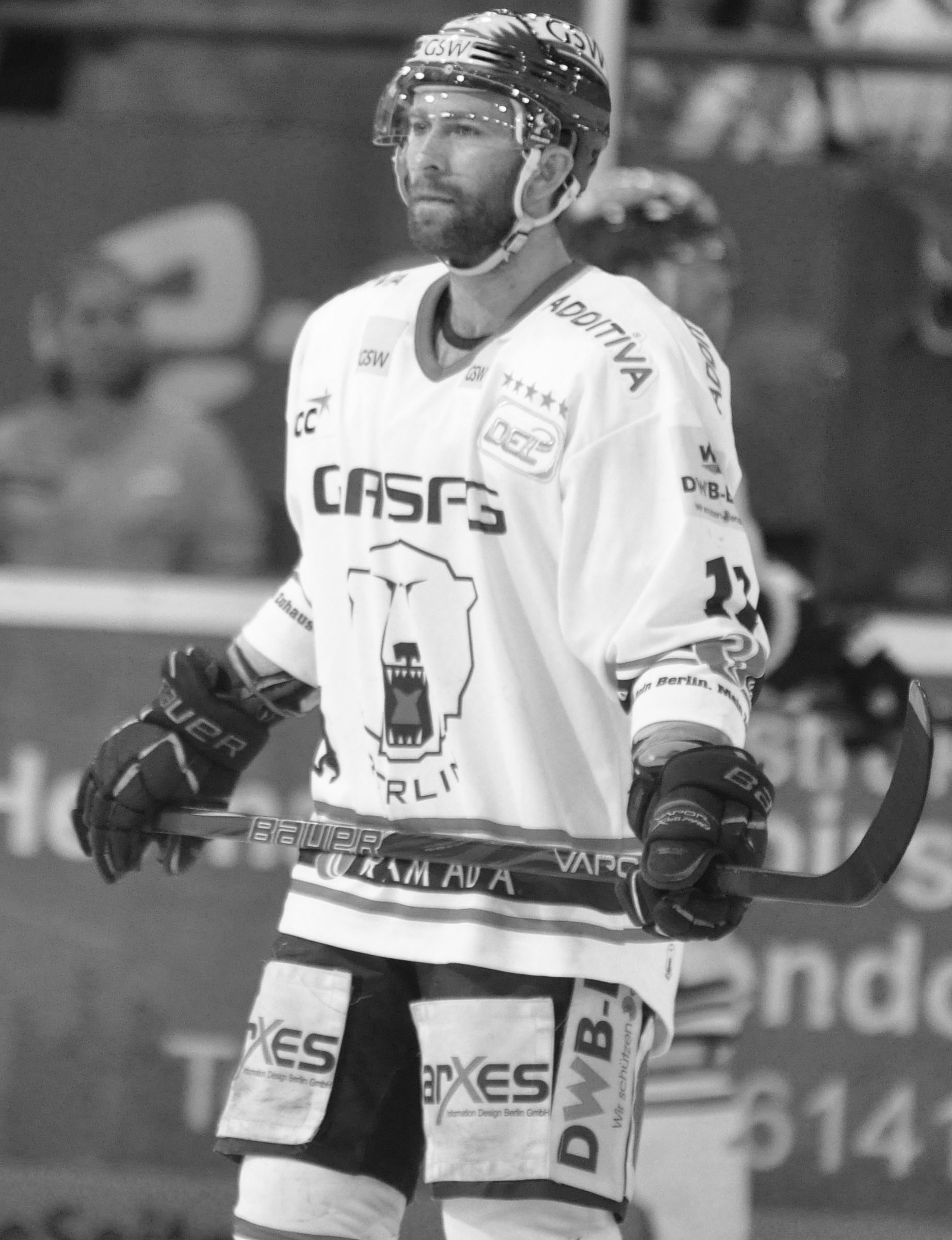 Straubing Tigers - Eisbären Berlin 07.04.2012 DEL PlayOff Halbfinale